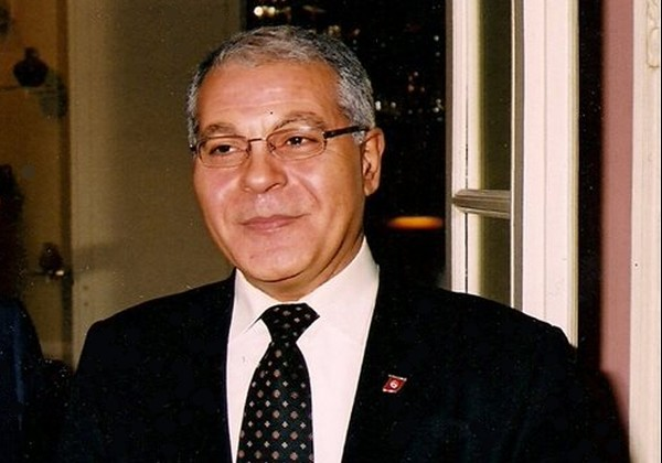 Portrait de Mezri Haddad